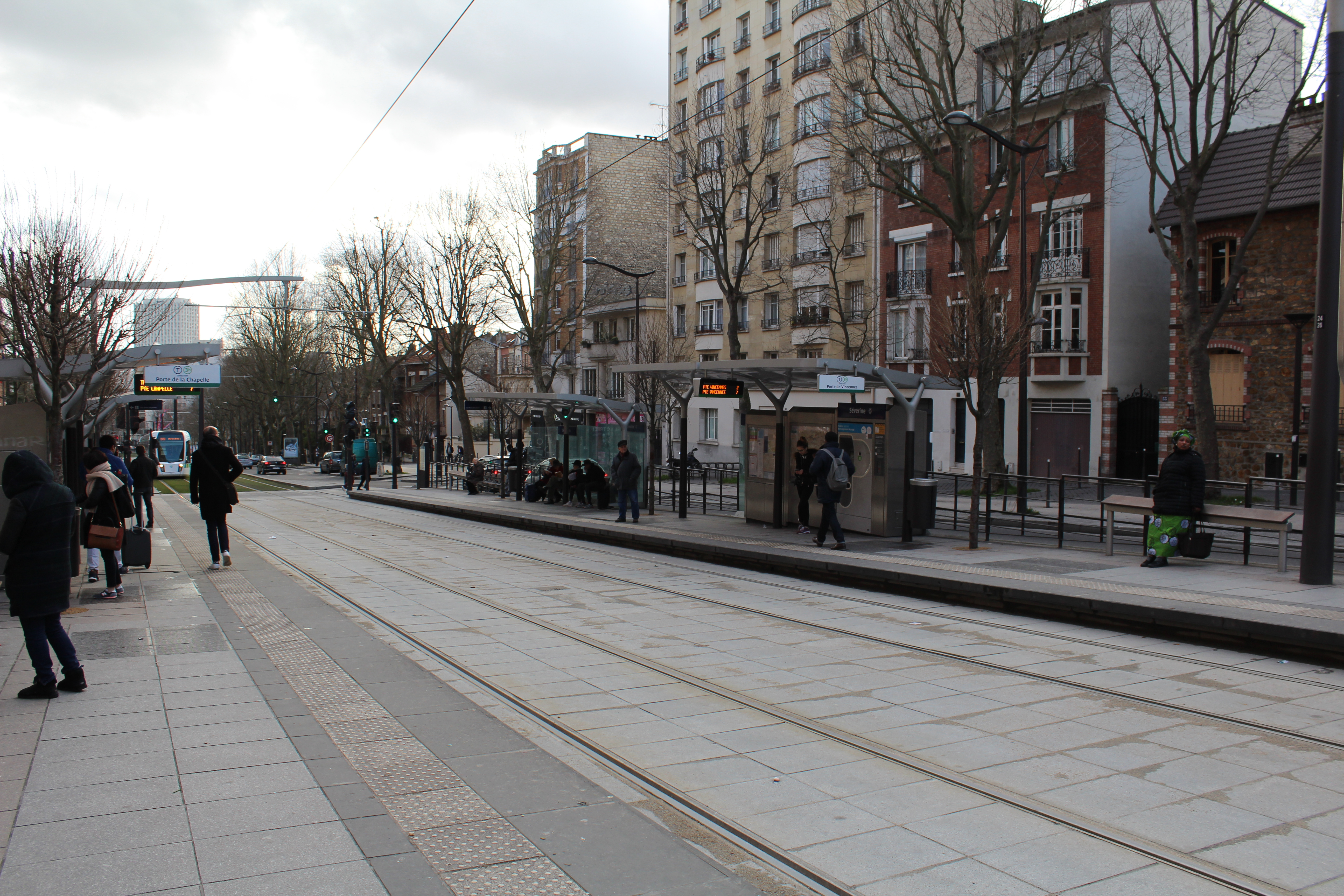 Station de tramway Séverine sur la ligne 3b du tramway d'Île-de-France.